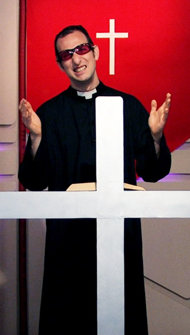 Don Giorgione, personaggio televisivo italiano del gruppo Buio Pesto, interpretato dall'attore di cabaret Andrea Di Marco.